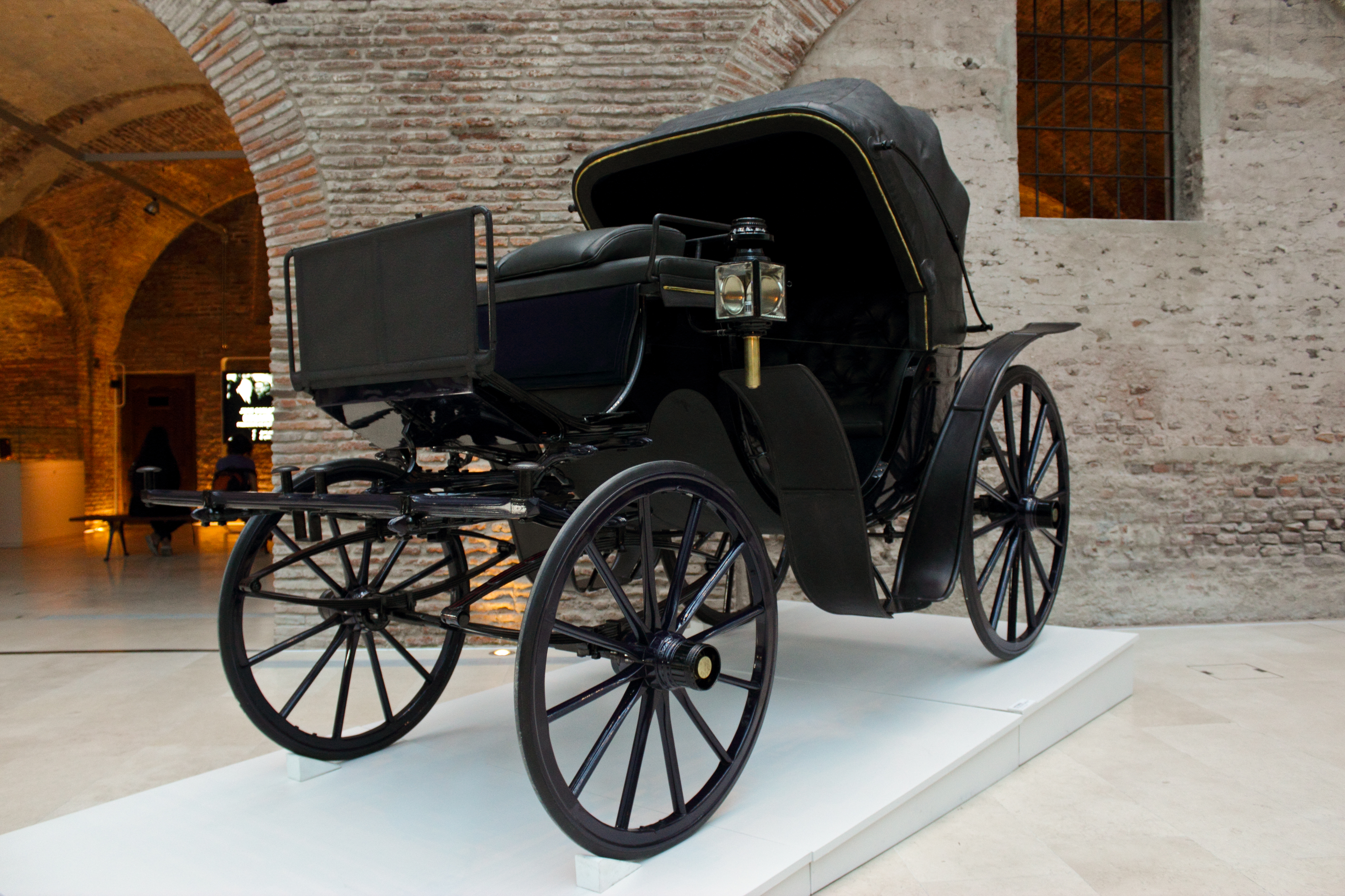 Carruaje Victoria de Robinson & Son, Cheshunt, Inglaterra (ca. 1895), de uso particular del Presidente José Evaristo Uriburu, cuyo monograma ostenta en los laterales. Fue el modelo de coche más popular en la ciudad y se mantuvieron circulando hasta los años 1920. Tuvo uso particular y público (era el "taxi" de entonces). Aún hoy se los puede encontrar en el barrio de Palermo al servicio de turistas.